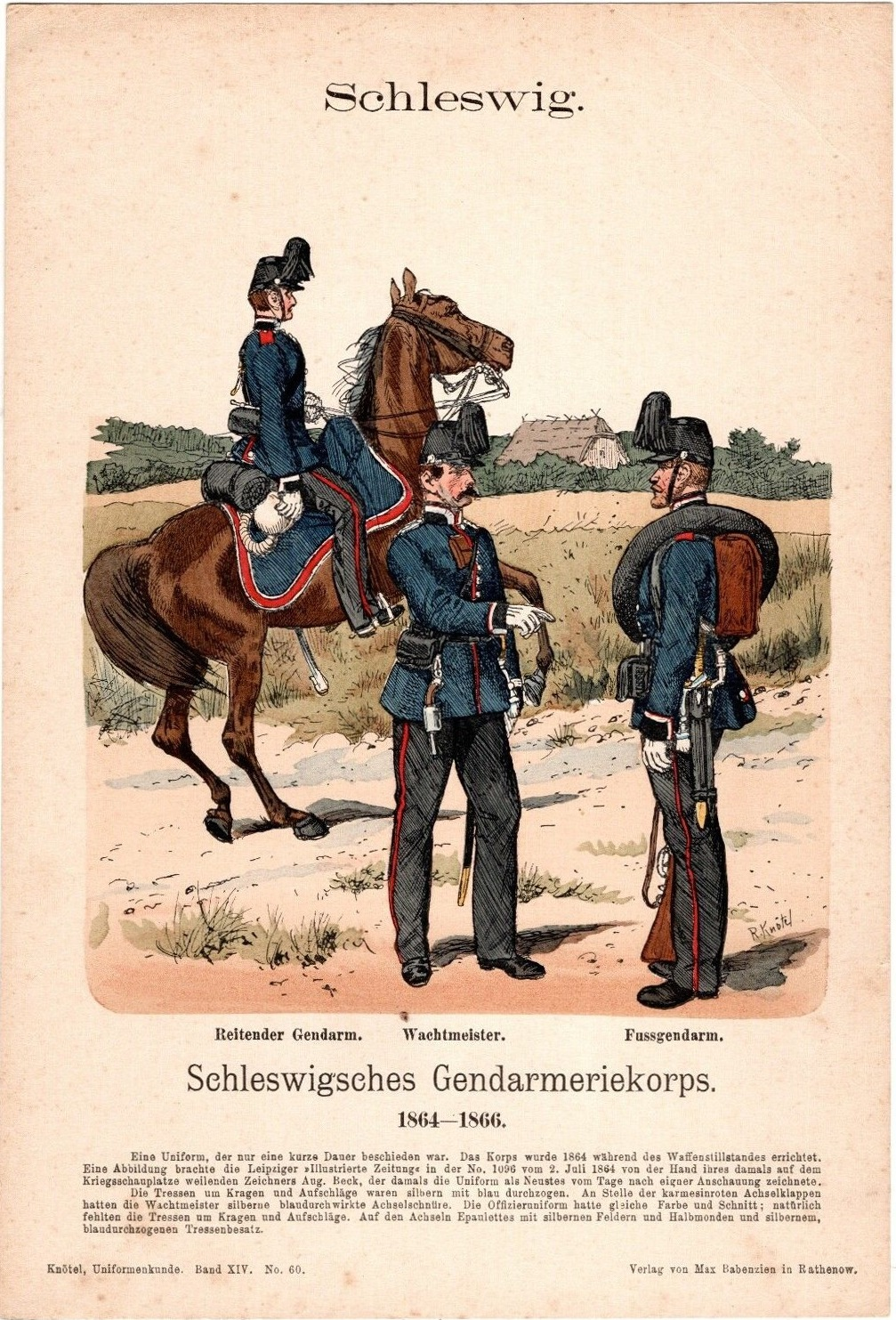 Die Schleswig Gandamerie